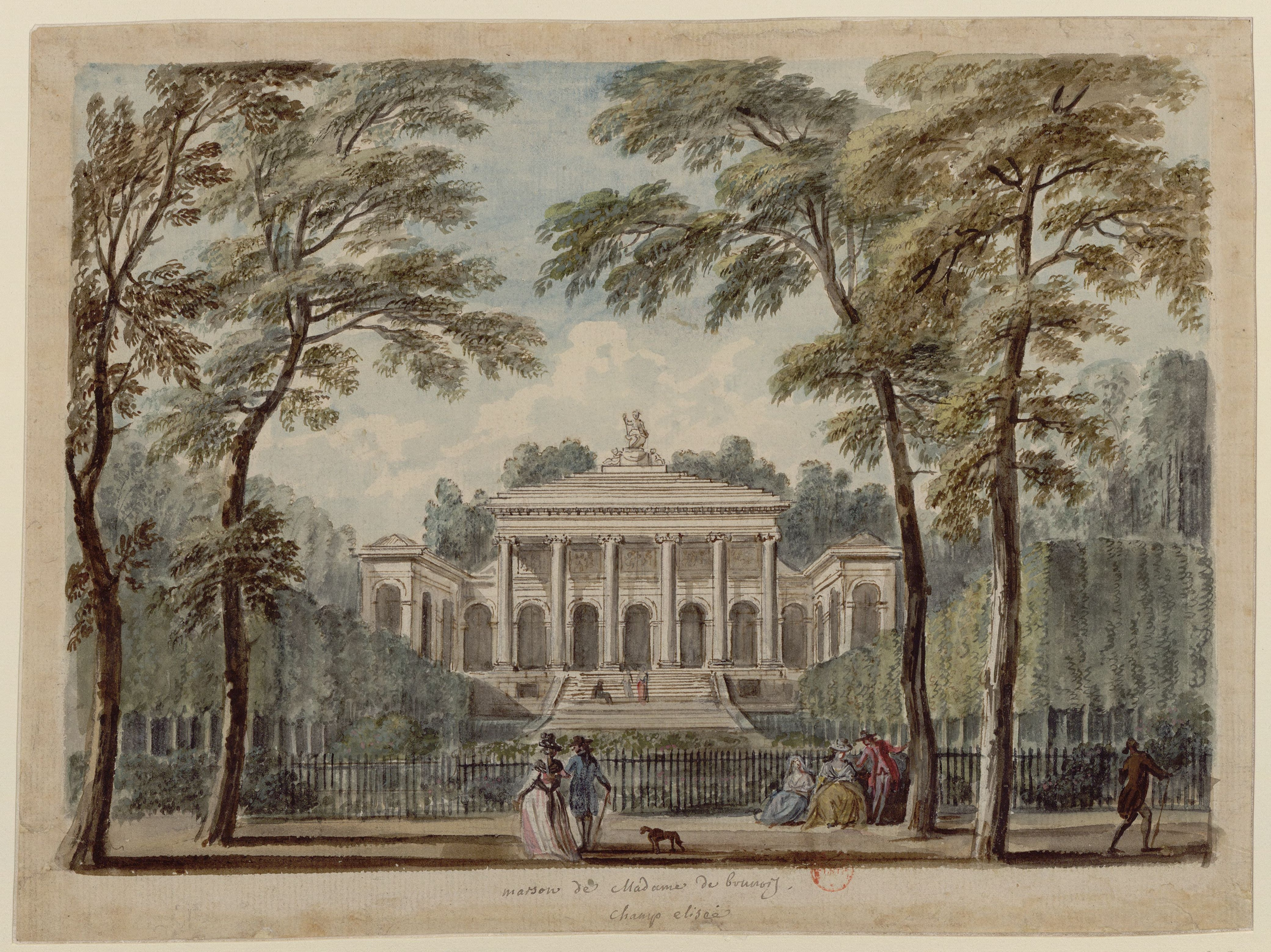 Hôtel de Brunoy, rue du Faubourg-Saint-Honoré, vue depuis les Champs-Elysées. Construit en 1779 par Etienne-Louis Boullée. Démoli en 1930.